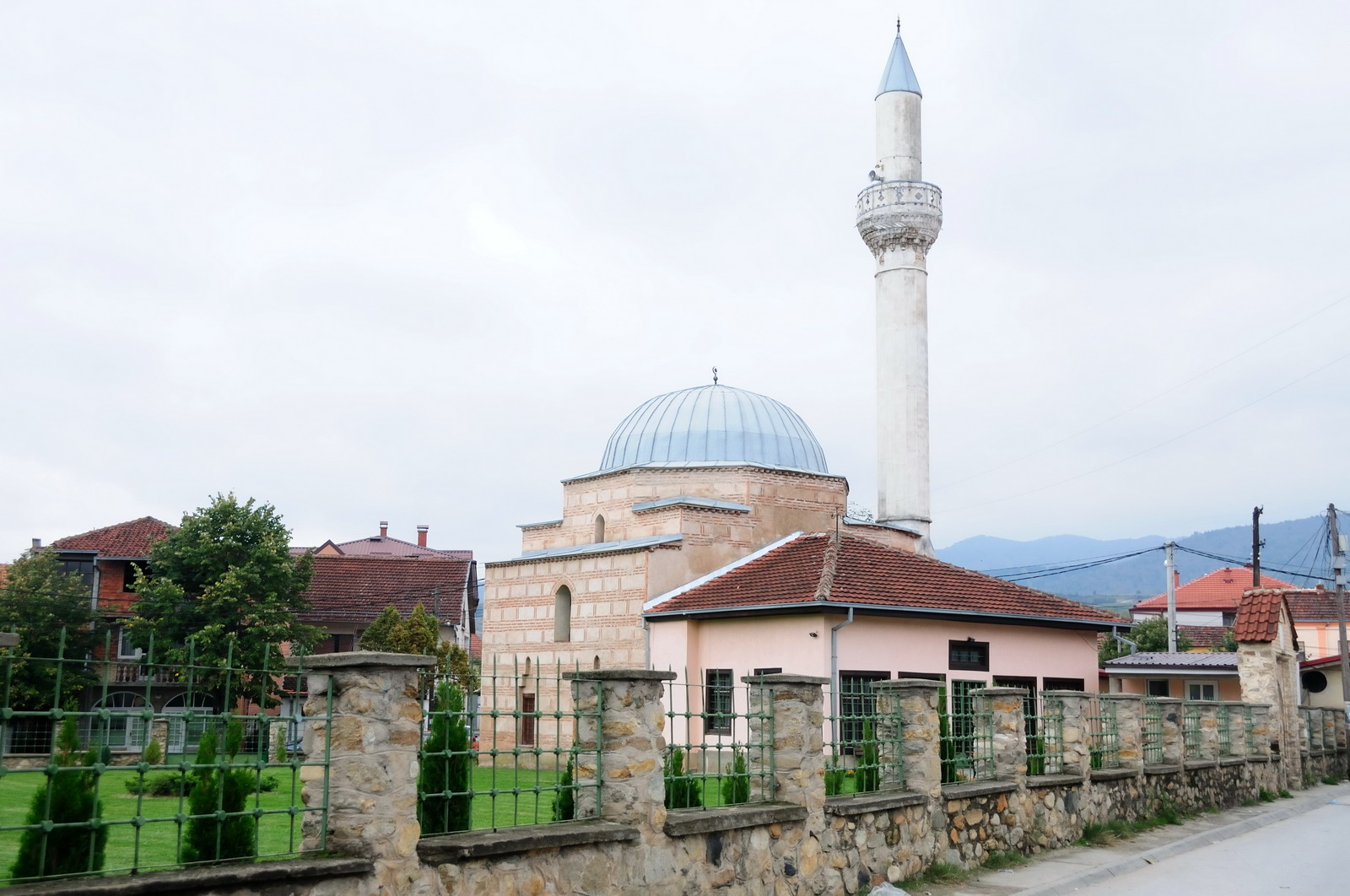 Djamija Hamza Bej-Bitola